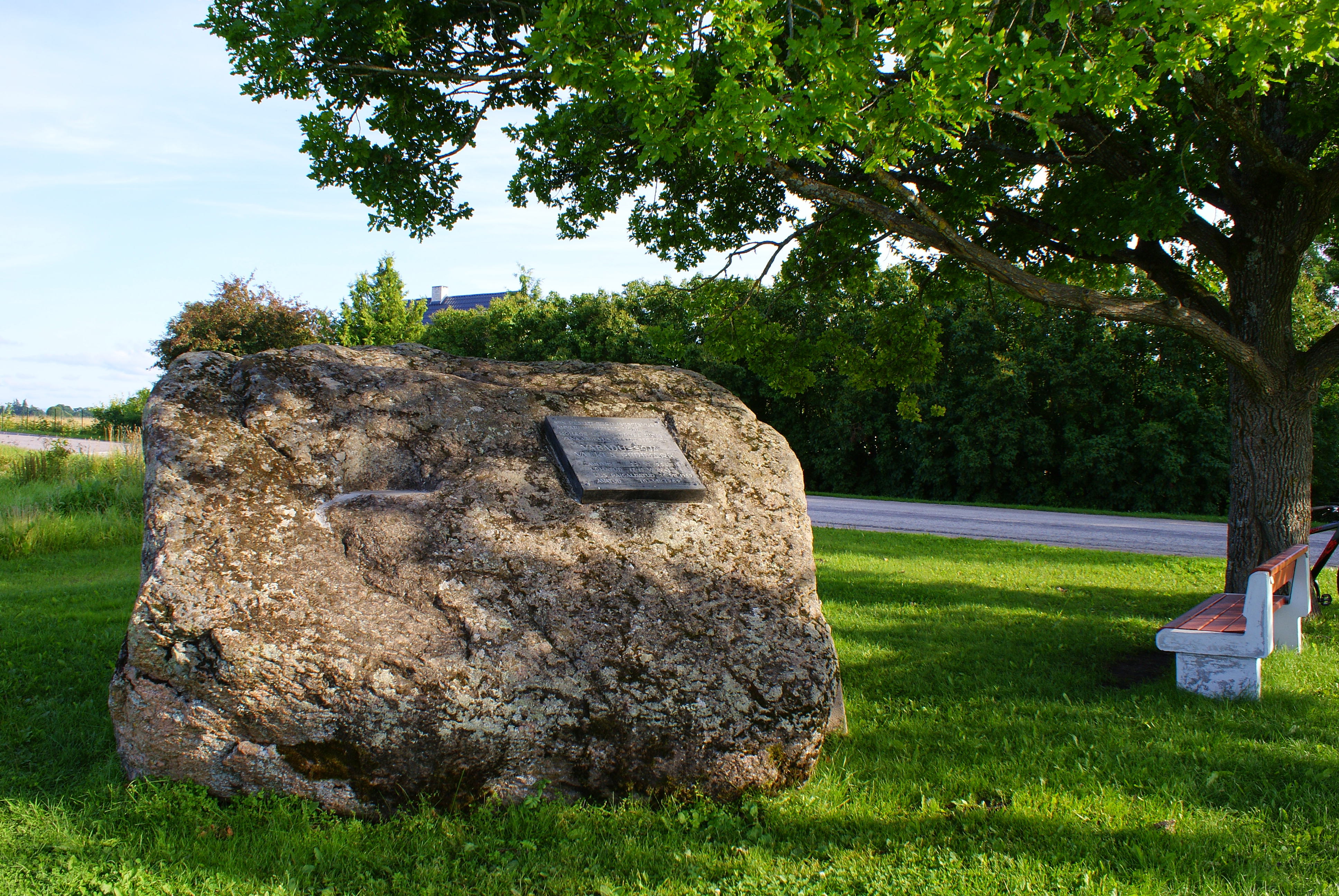 Vabadussõja Valkla lahingu mälestusmärk